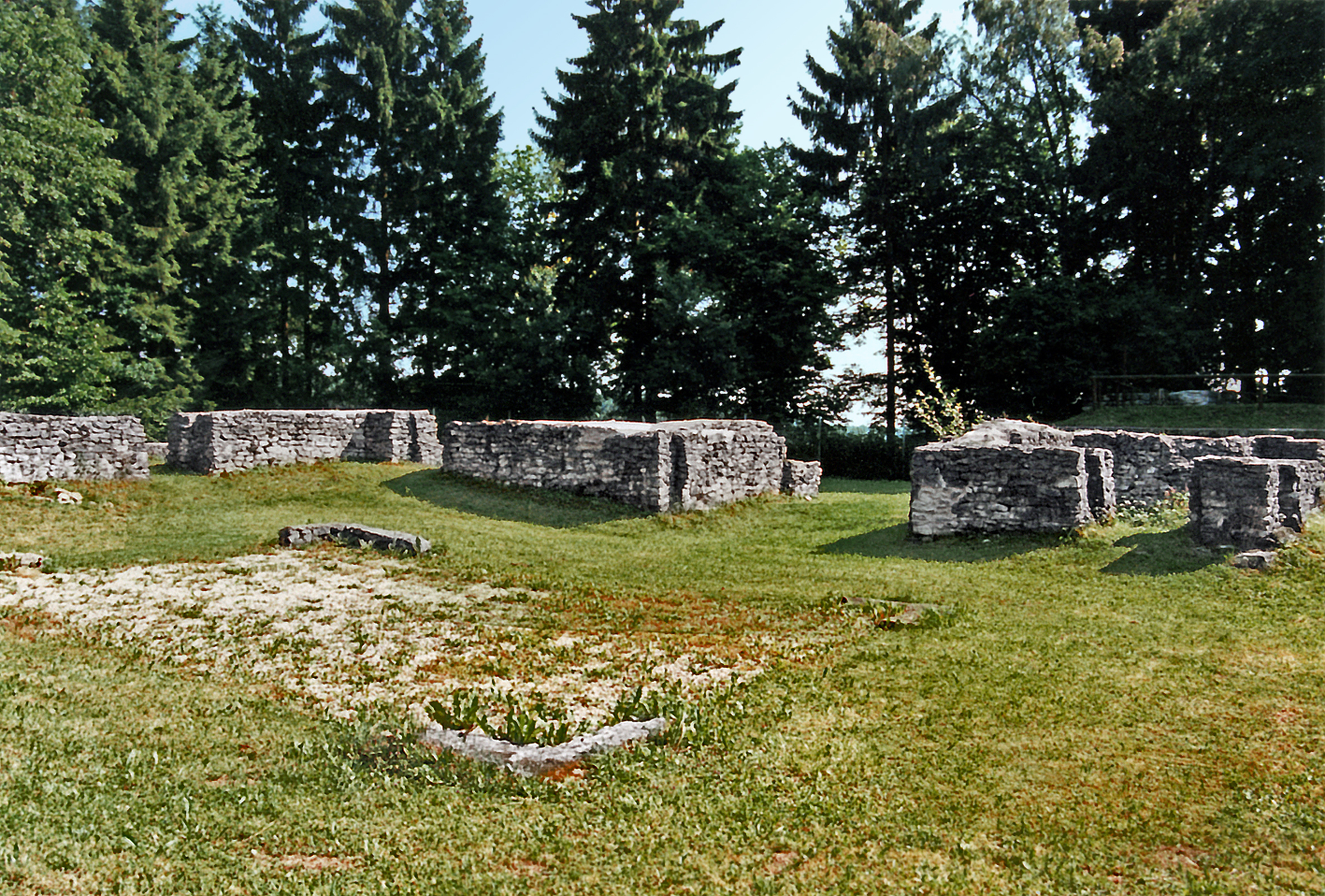 Blick aus dem hinteren Teil des Kleinkastells „In der Harlach“ bei Burgsalach nahe dem rätischen Limes in Bayern über den ehemaligen Innenhof (geschotterte Fläche) auf des zangenförmige Tor. Zustand im August 1991.